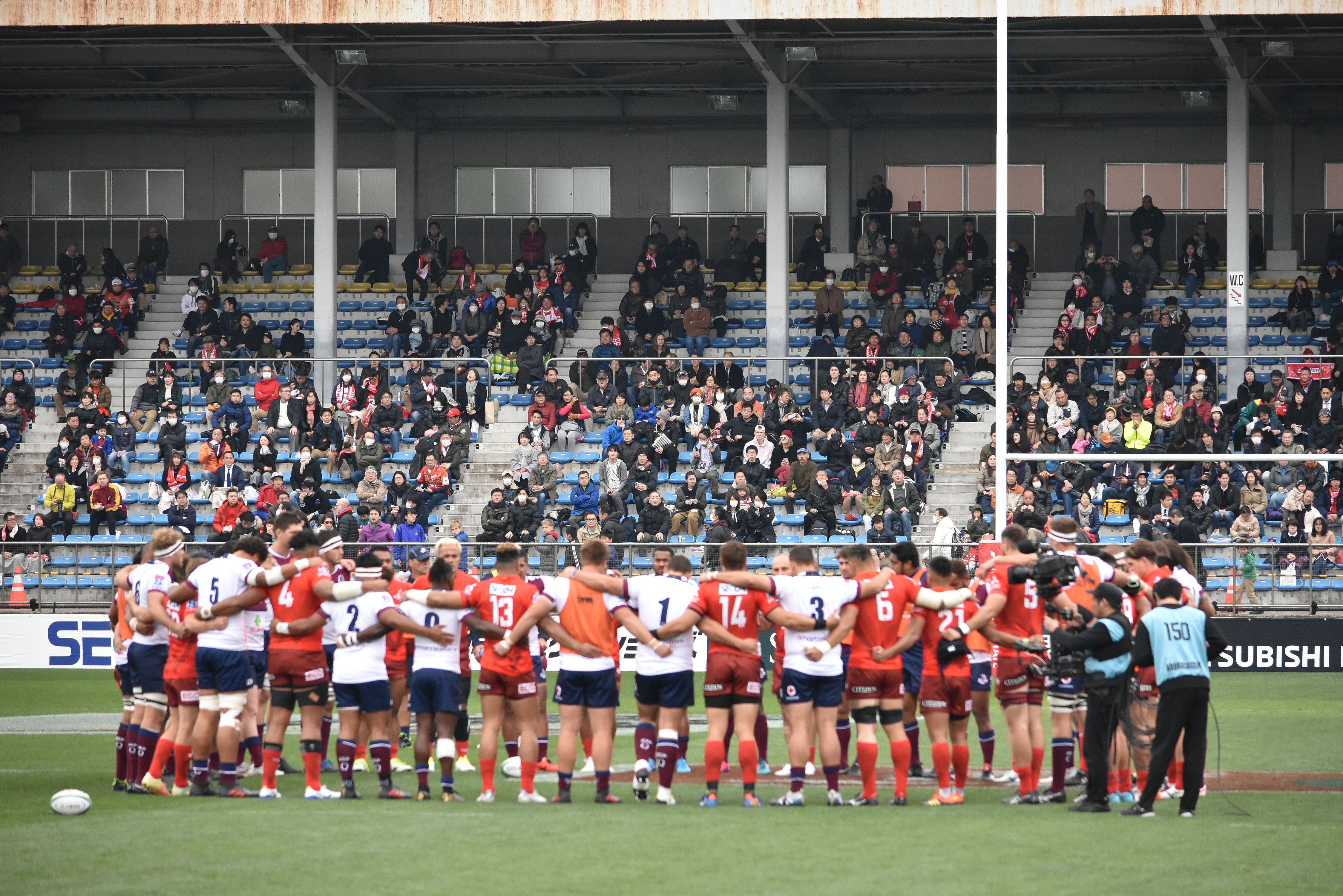 スーパーラグビー Nikon D3400